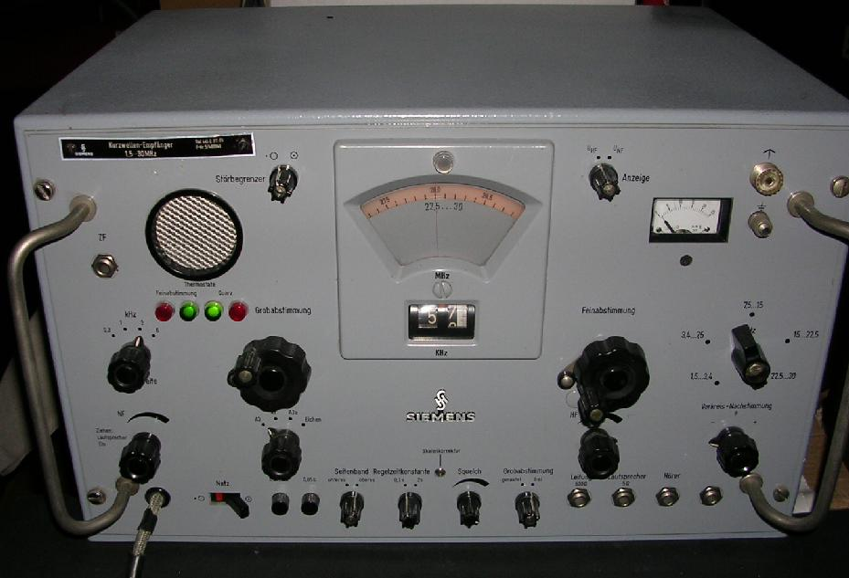 Siemes Empfänger E311 Version 8d in Röhrentechnik ca. 1965